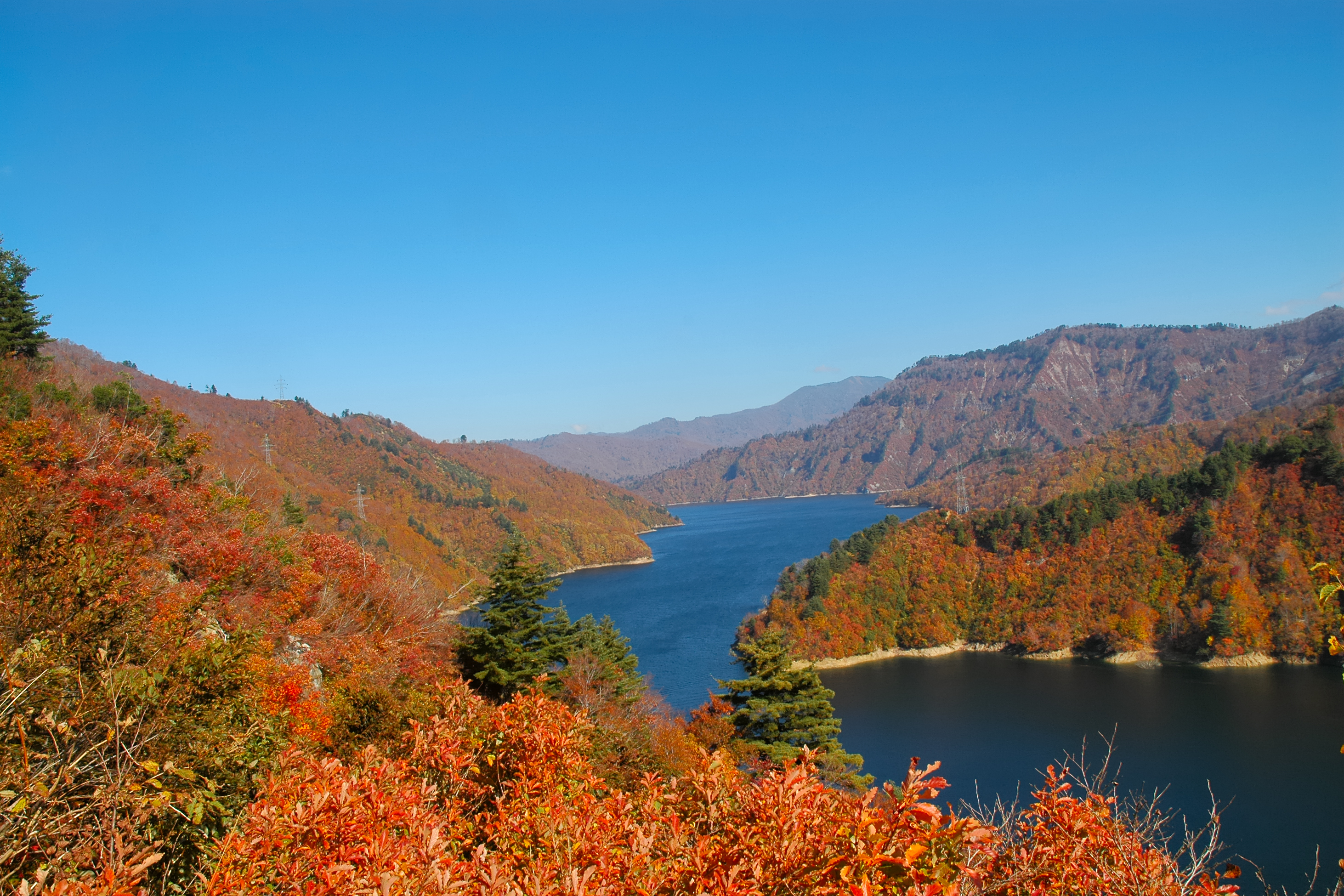 Lake Okutadami (奥只見湖)